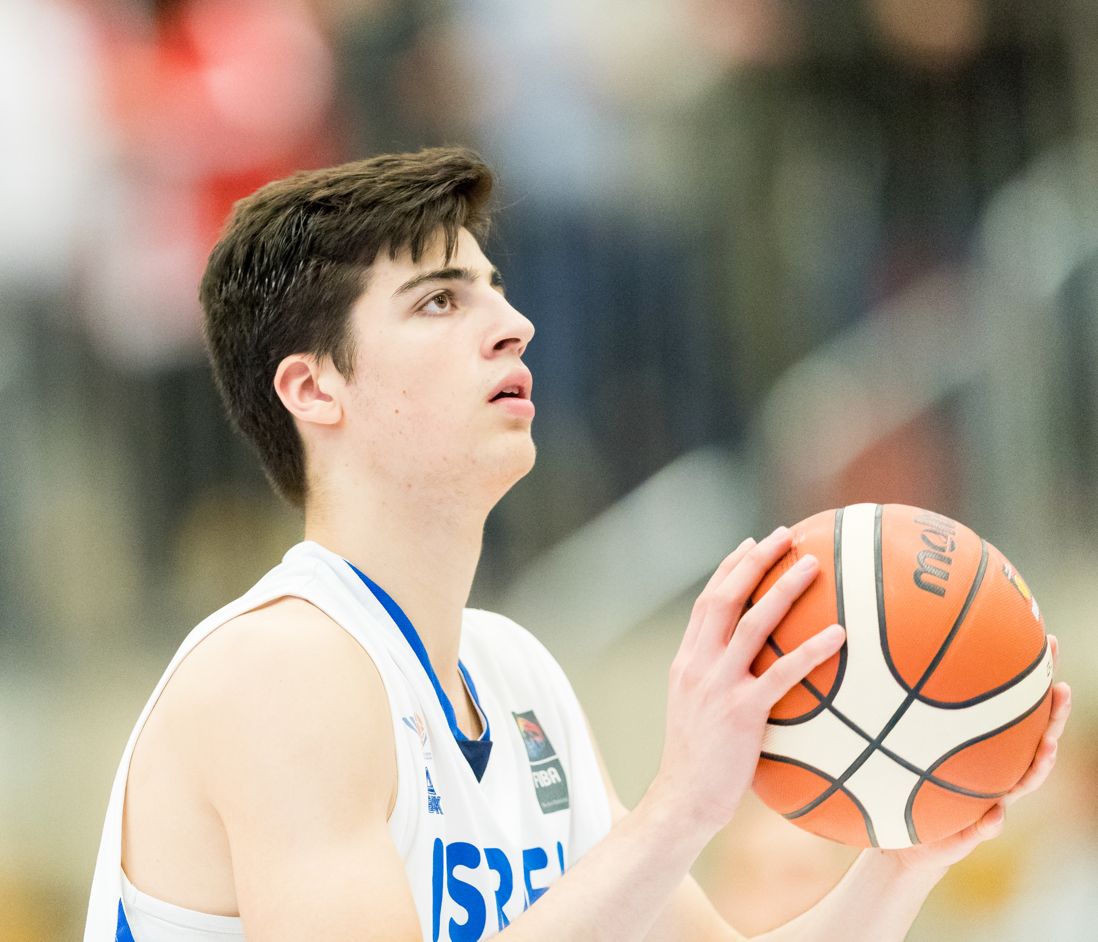 Israel vs Argentinia 106:83 during Basketball Albert Schweitzer Turnier at GBG Halle, Mannheim, Baden-Württemberg, Germany on 2018-04-02, Photo: Sven Mandel